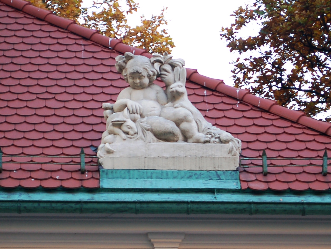 Warsaw, Mokotowska 25, Instytut Adama Mickiewicza